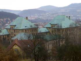 Die Höhere Technische Lehranstalt in Bodenbach/Elbe (Sudetenland)